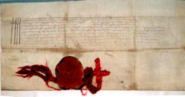 Ştefan cel Mare. Danie sălaşe de ţigani pentru Episcopia Rădăuţi